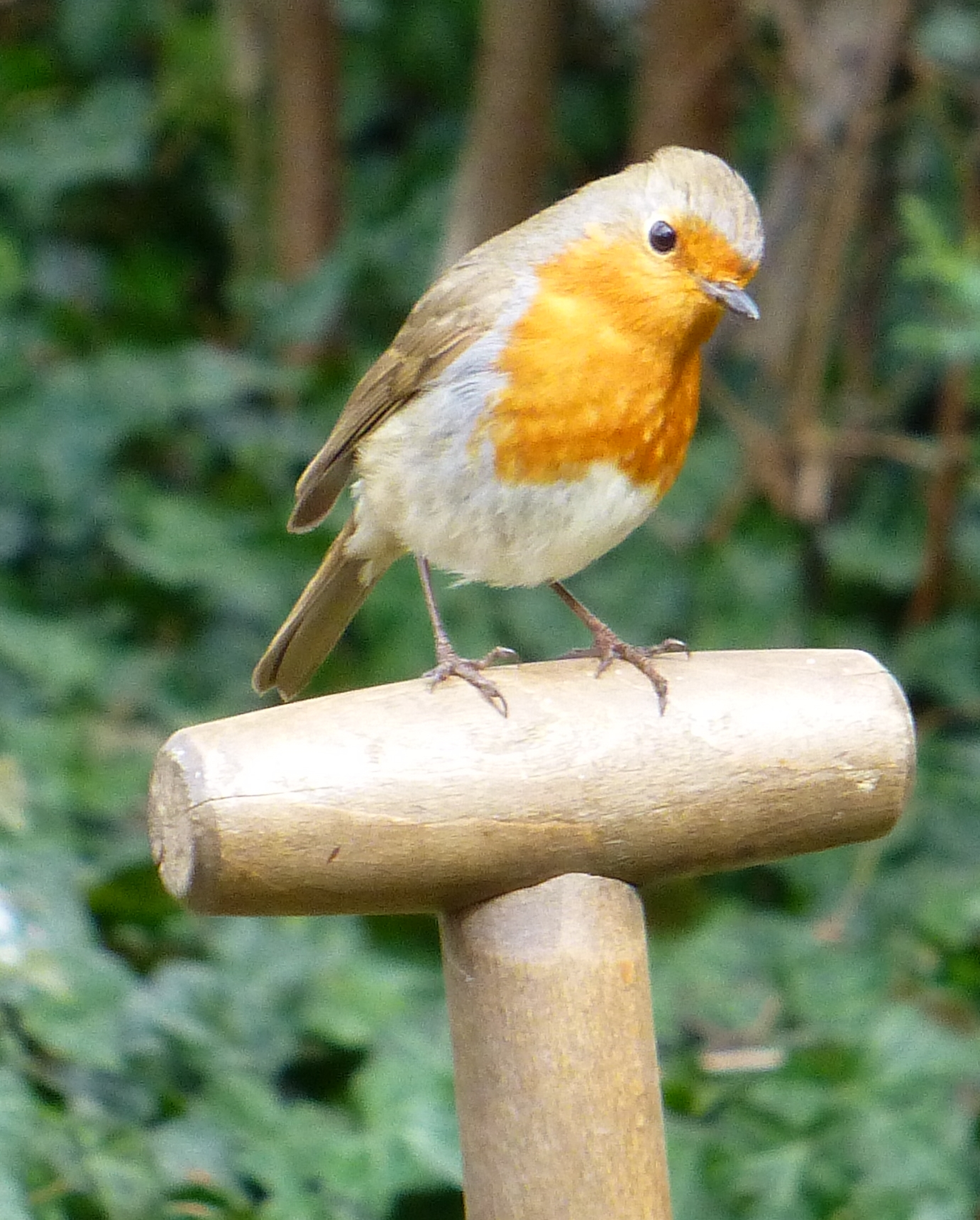 Rotkehlchen Erithacus rubecula in Radeberg mit geringer Fluchtdistanz